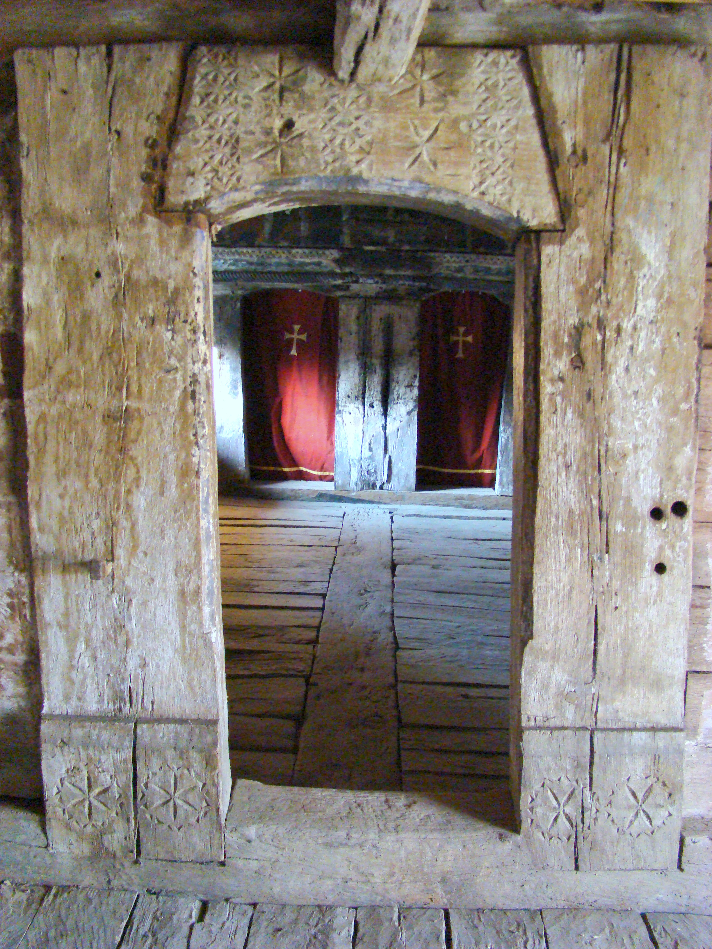 Biserica de lemn "Sfinții Arhangheli Mihail şi Gavriil, sat CALNA; comuna VAD, județul Cluj